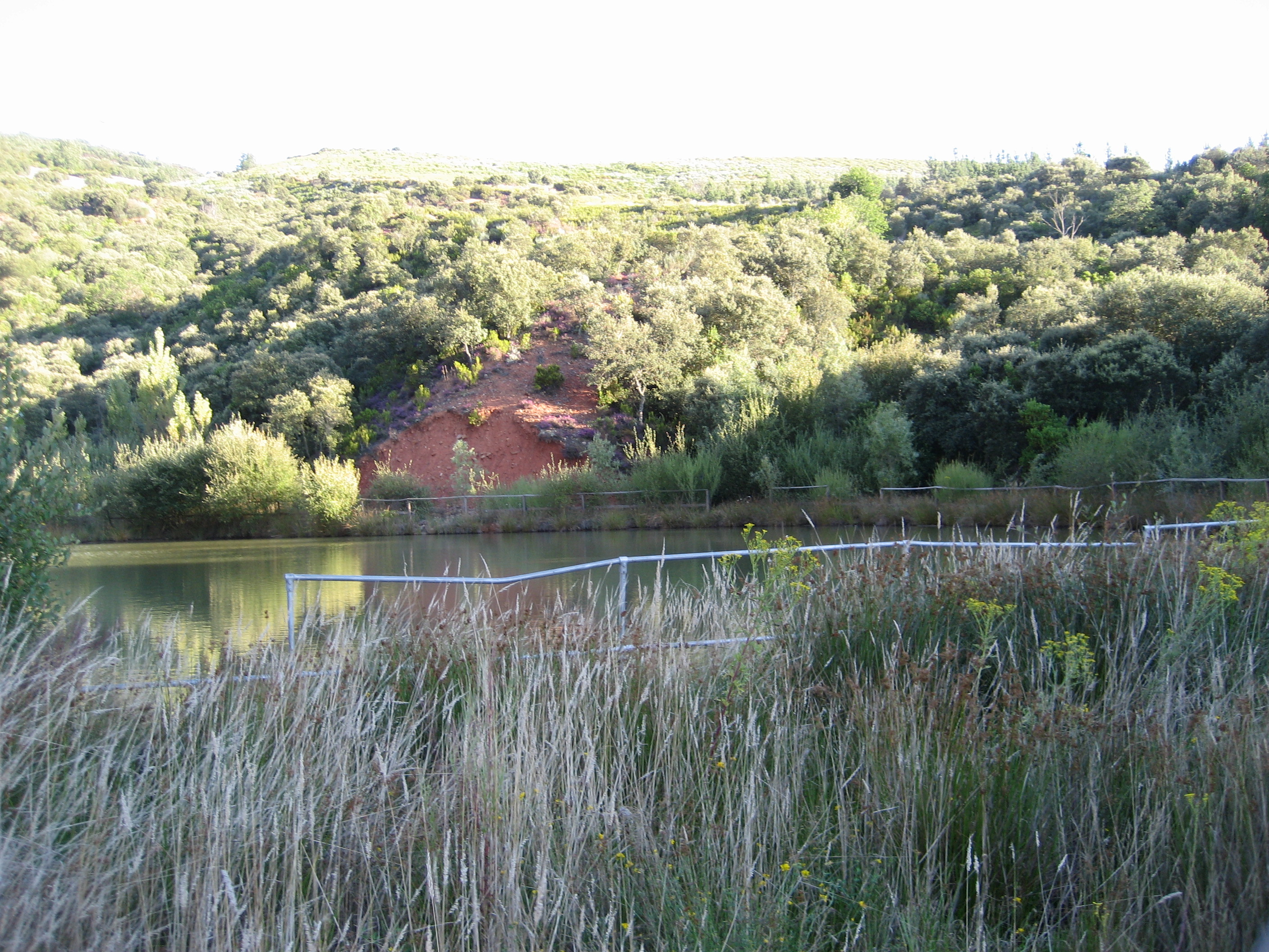 Lago del Encinal. Castropodame (El Bierzo, León, España).